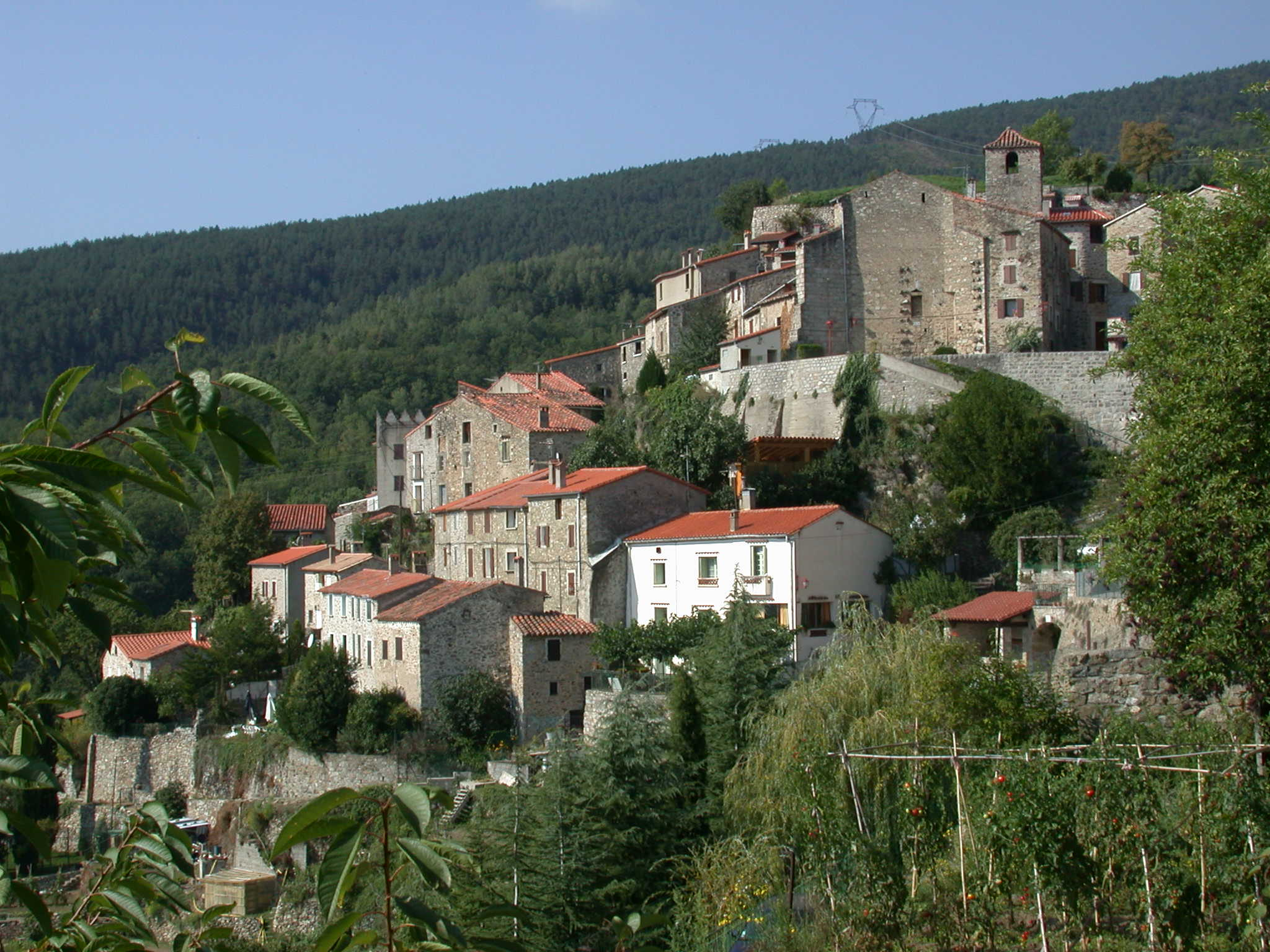 Village de Corsavy 66150 (Pyrénées Orientales, Languedoc Roussillon, France)